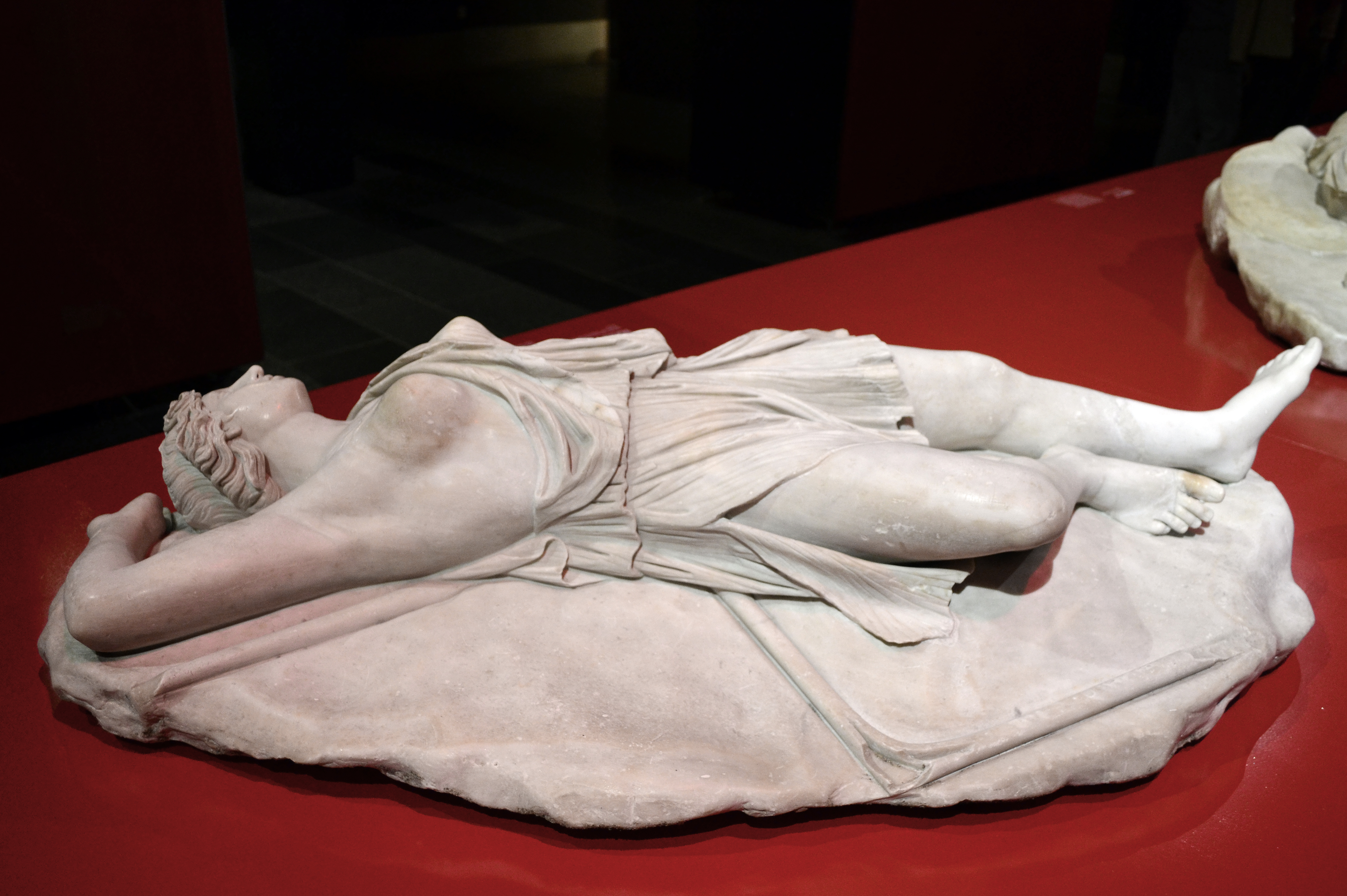 Römische Kopie (trajanisch-hadrianisch) einer hellenistischen Skulptur (um 150 v.Chr.). Mamor. FO: Rom, 1514. Leihgabe des Museo Archeologico Nazionale, Napoli.